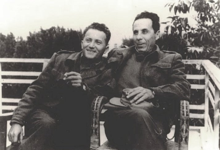 רב סרן עשהאל צוקרמן מגדרה ורב סרן מיכאל הנגבי: שני המושלים הצבאיים הראשונים במדינת ישראל. עשהאל צוקרמן מושל צבאי במגדל, כיום אשקלון. מיכאל הנגבי מושל צבאי של באר-שבע.